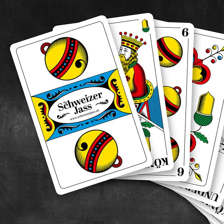 Schweizer Jasskarten